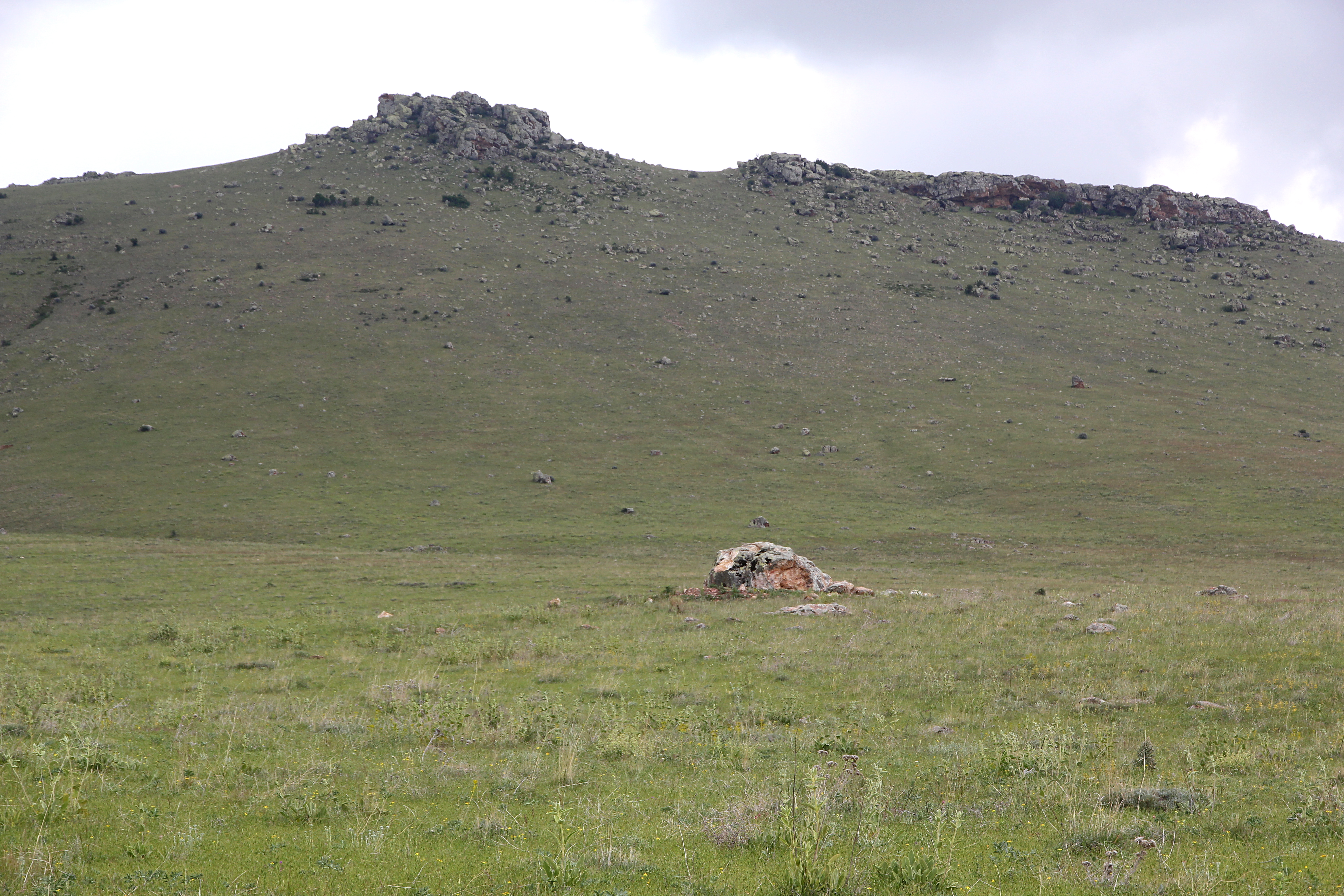 Malkaya, hethitischer Inschriftenstein bei Kırşehir, Zentraltürkei, Ansicht von Südwesten